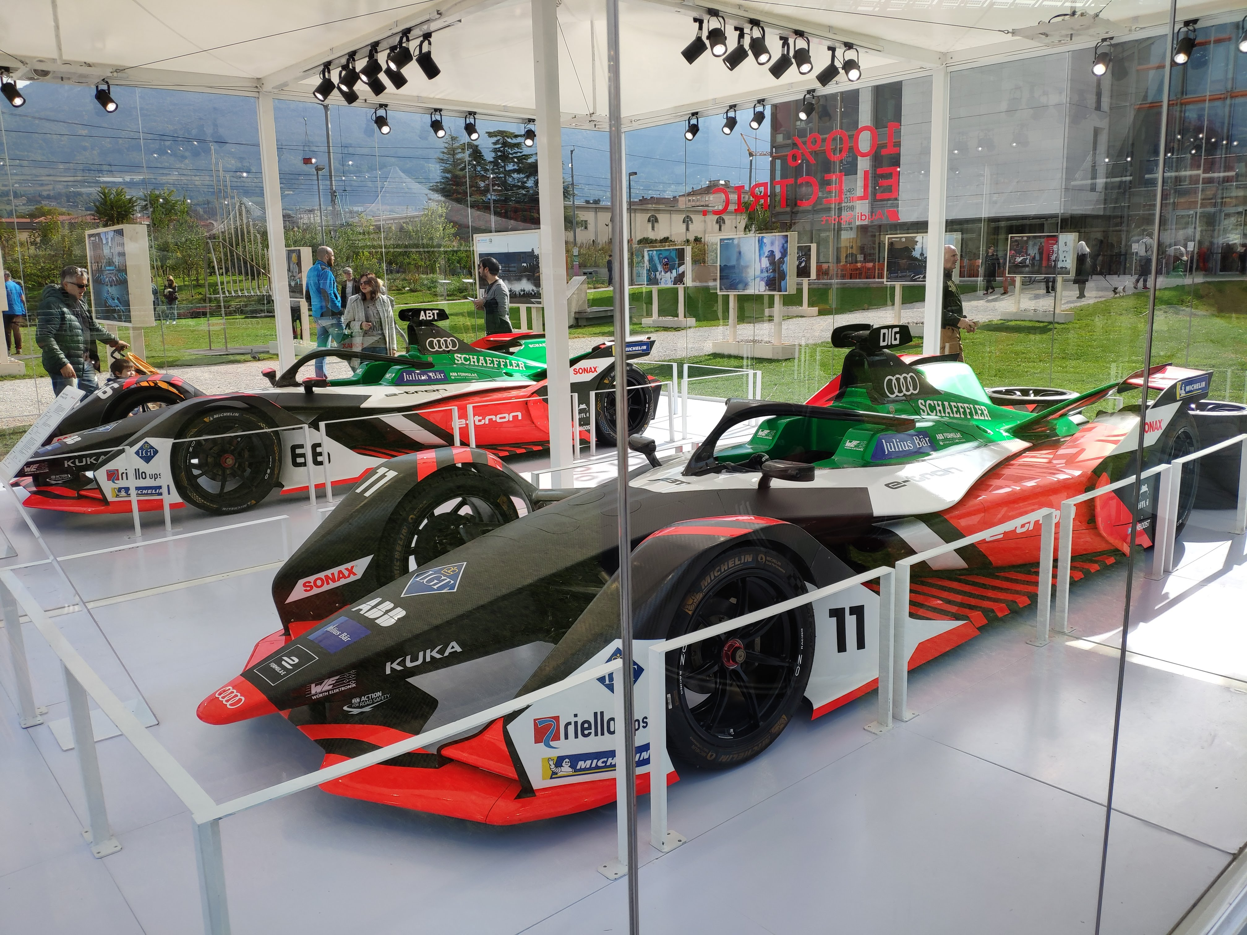 Le Audi e-tron FE06 di Daniel Abt e Lucas Di Grassi al Festival dello Sport 2019 a Trento (TN)